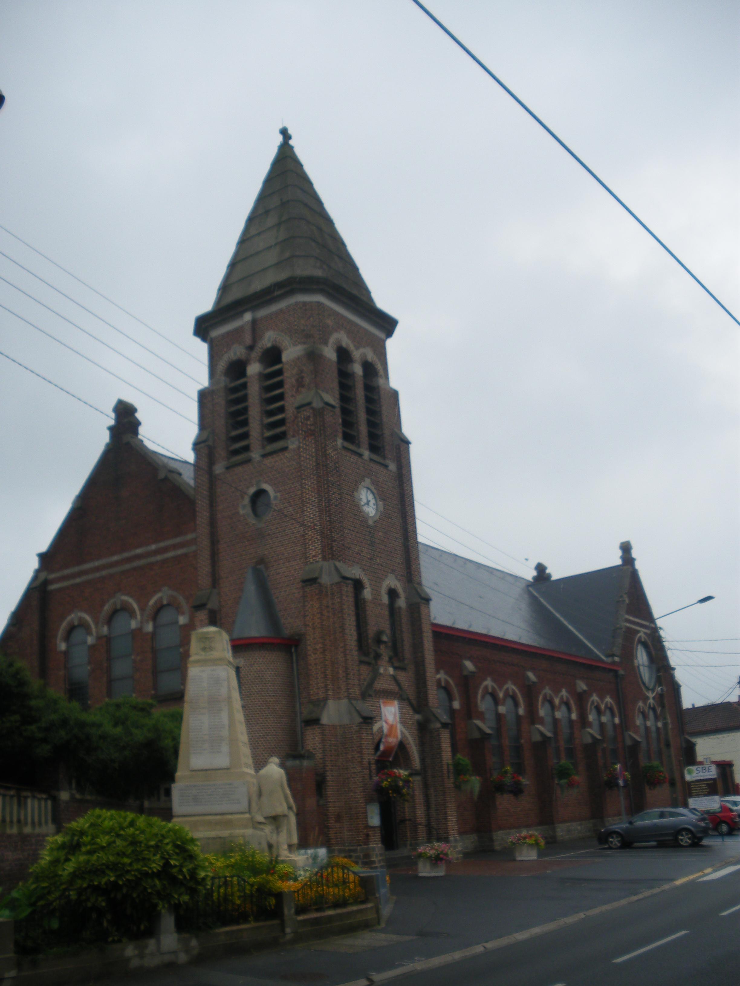 Vue de l'église de Bauvin.